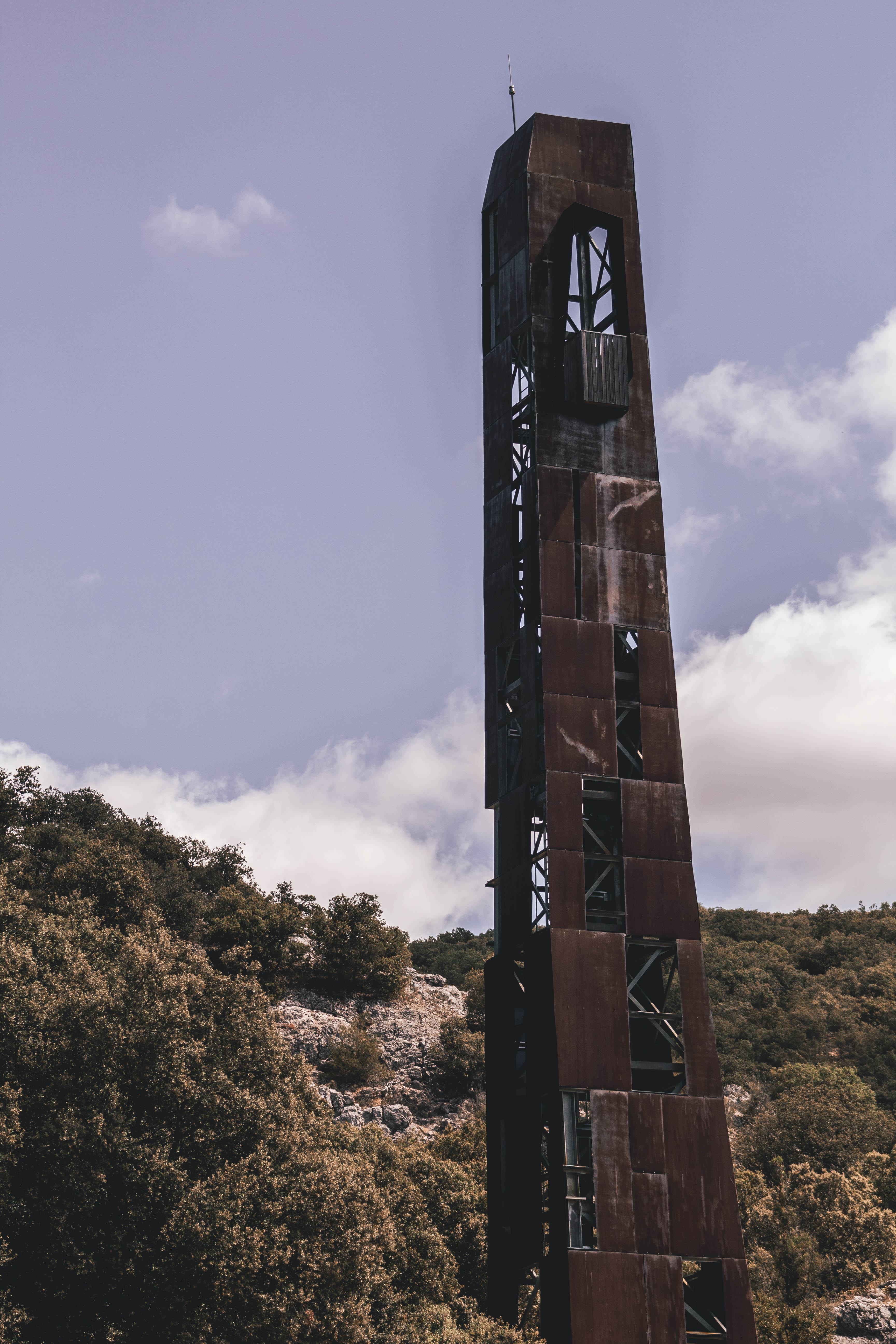 Torre incompleta de acero.